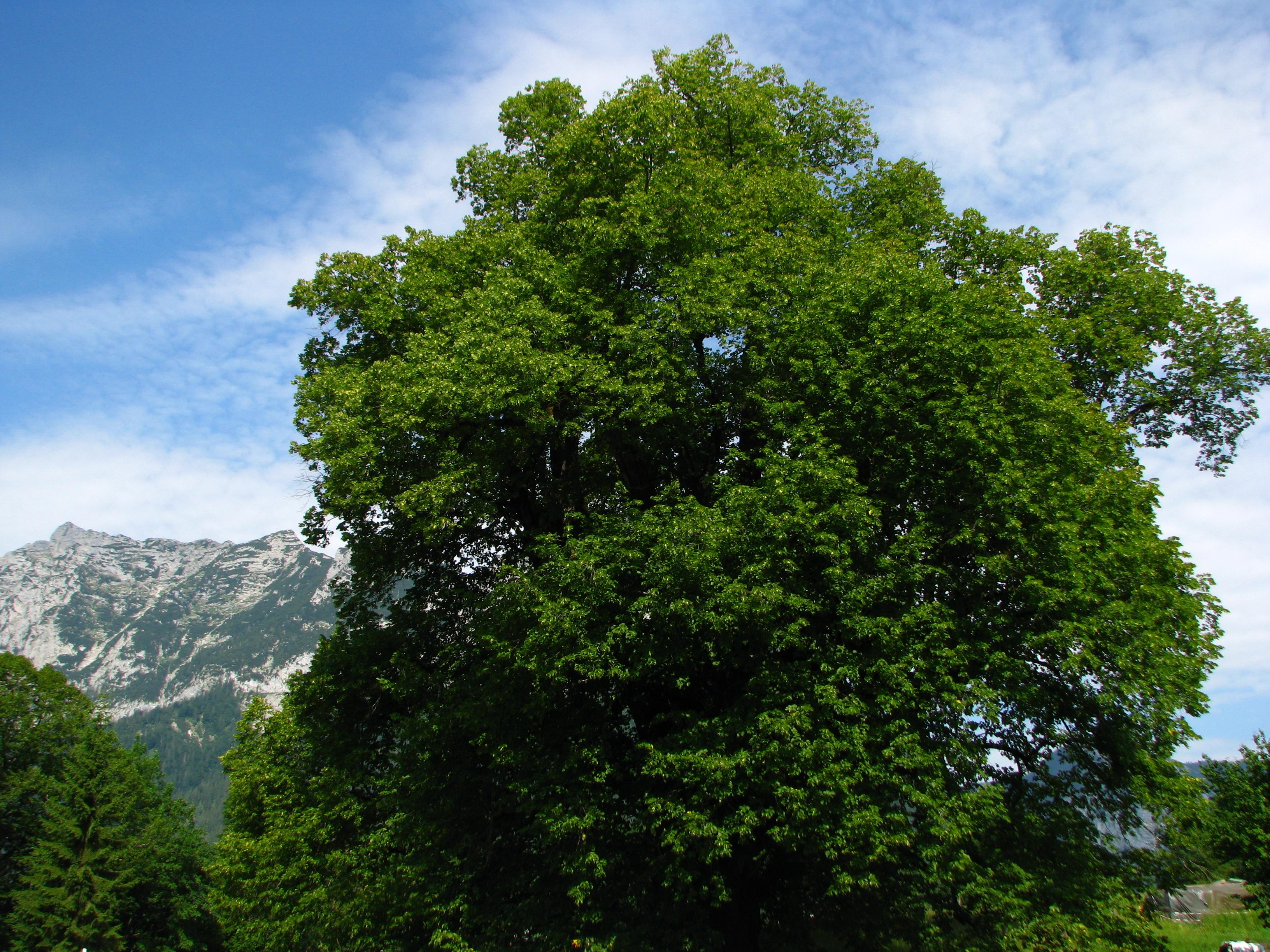 Die Hindenburglinde in Ramsau mit Gipfeln der Reiteralpe.